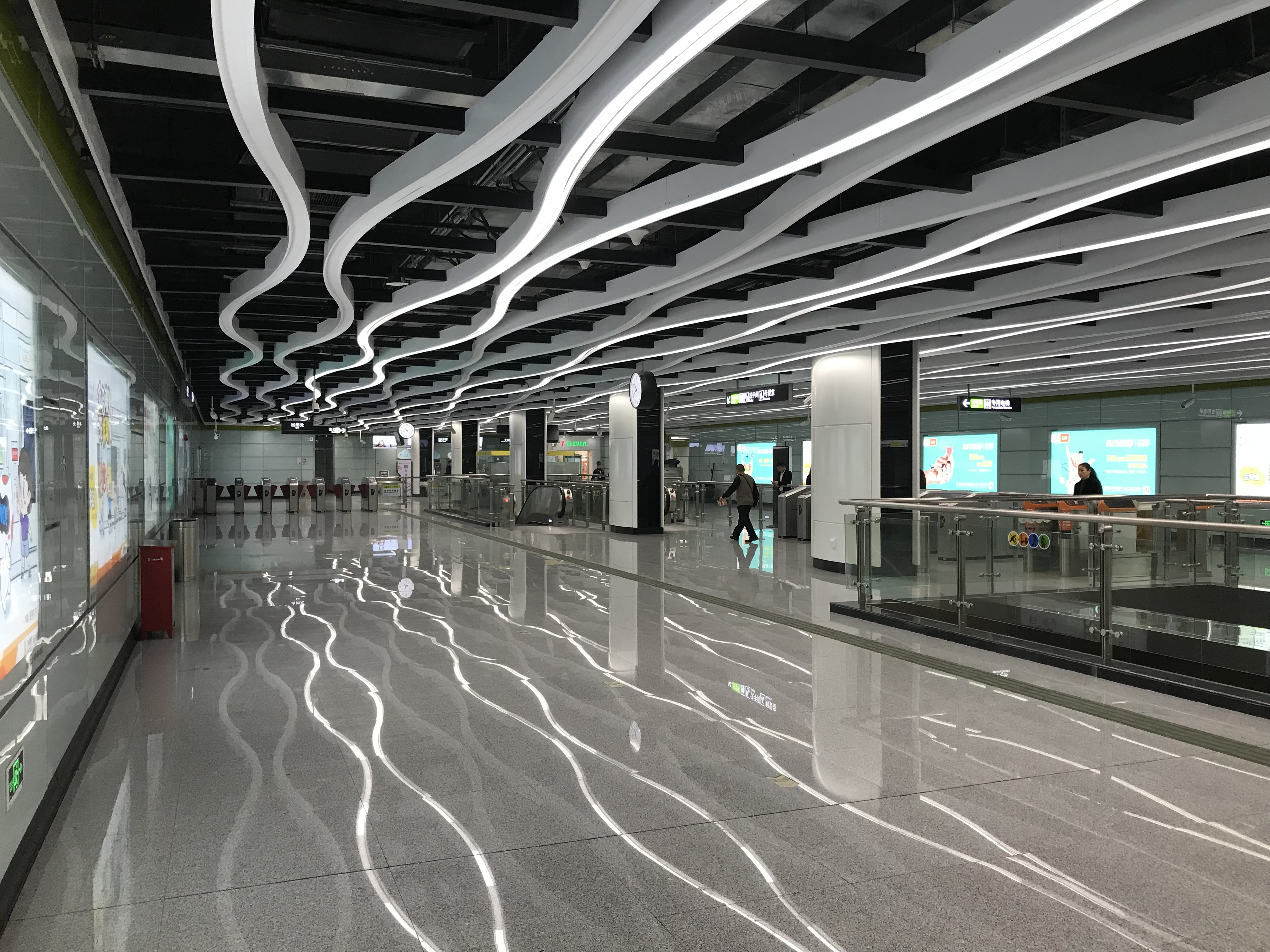 广州地铁夏园站